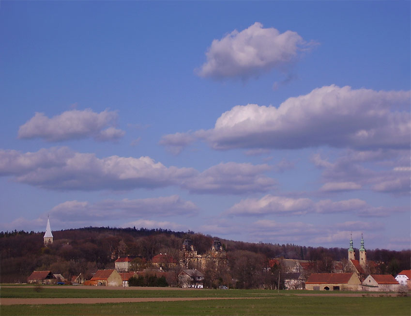 Stolec - katholische Kirche, Schlossruine, evangelische Kirche